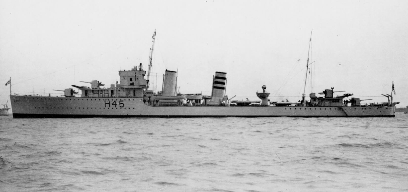 Der britische Zerstörer HMS Acheron